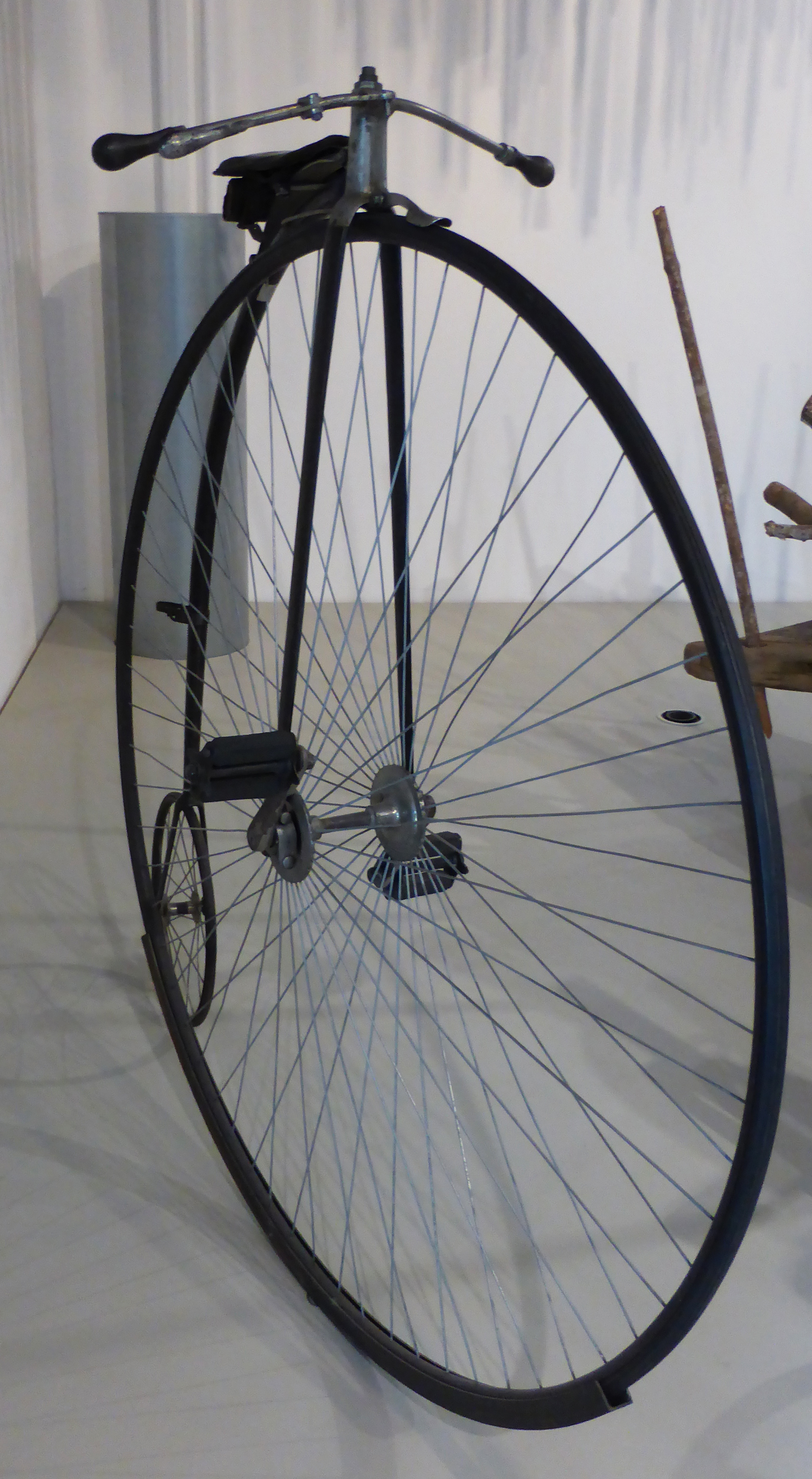 Hochrad, Rudge Cycle Co. Ltd., Coventry. Baujahr 1877. Ausgestellt im Deutschen Technikmuseum in Berlin. Wikipedianische KulTour am 10. Oktober 2015 in der Ausstellung des Museums.